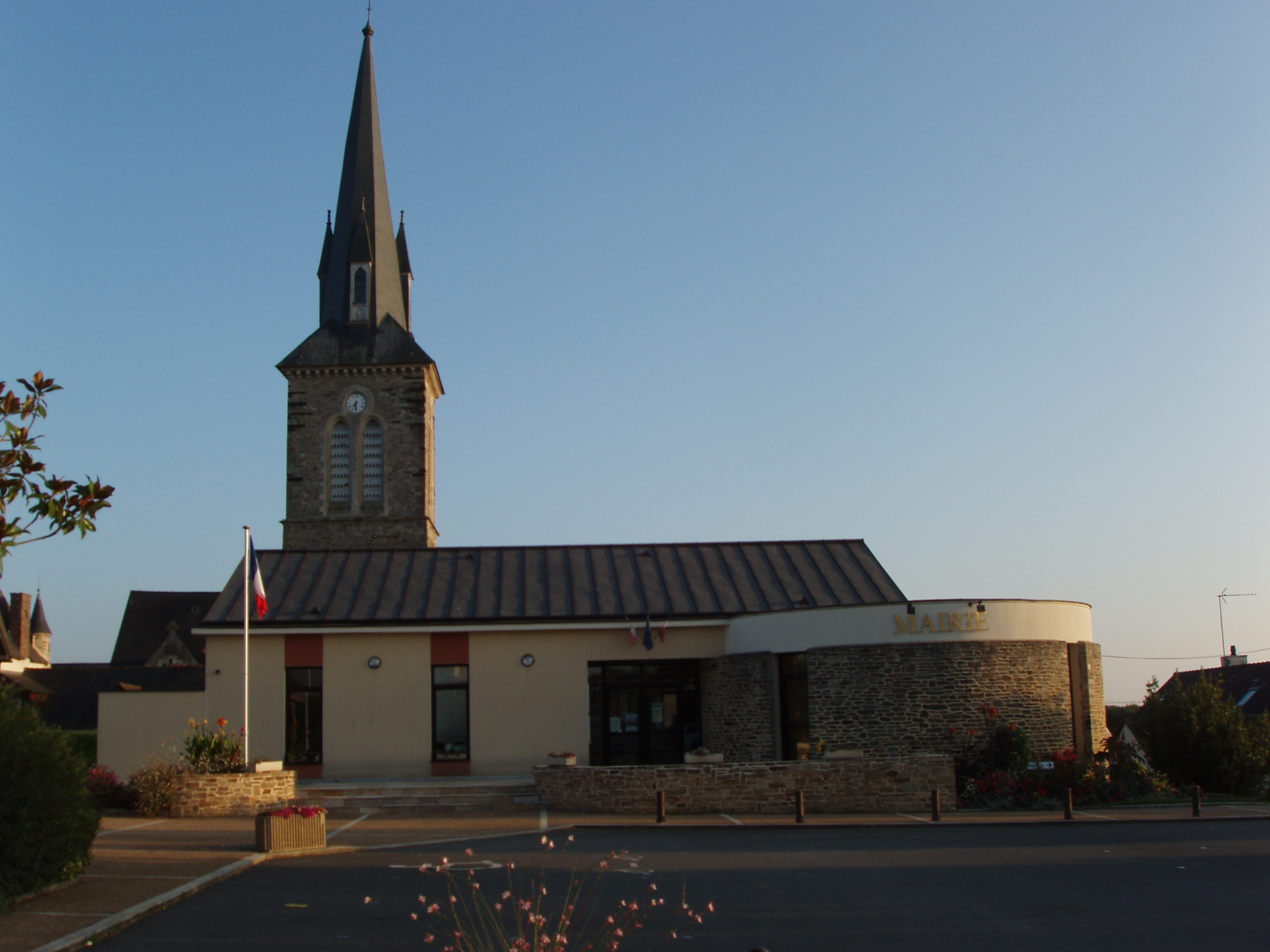 Mairie et église de St Jean sur Vilaine